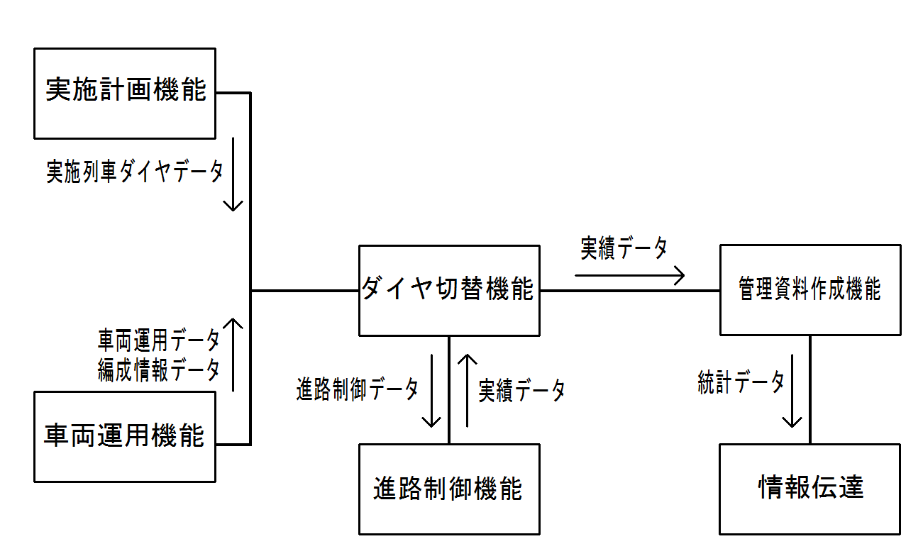 東海道・山陽新幹線で使用されている新幹線運転管理システム（COMTRAC）の基本的な機能関連図